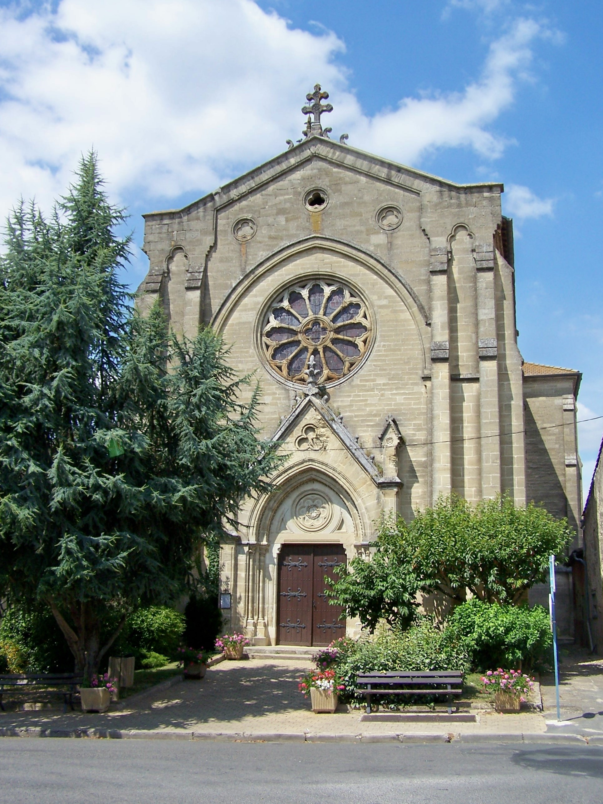 Porche de l'église Saint-Louis de Castets-en-Dorthe, Gironde, France